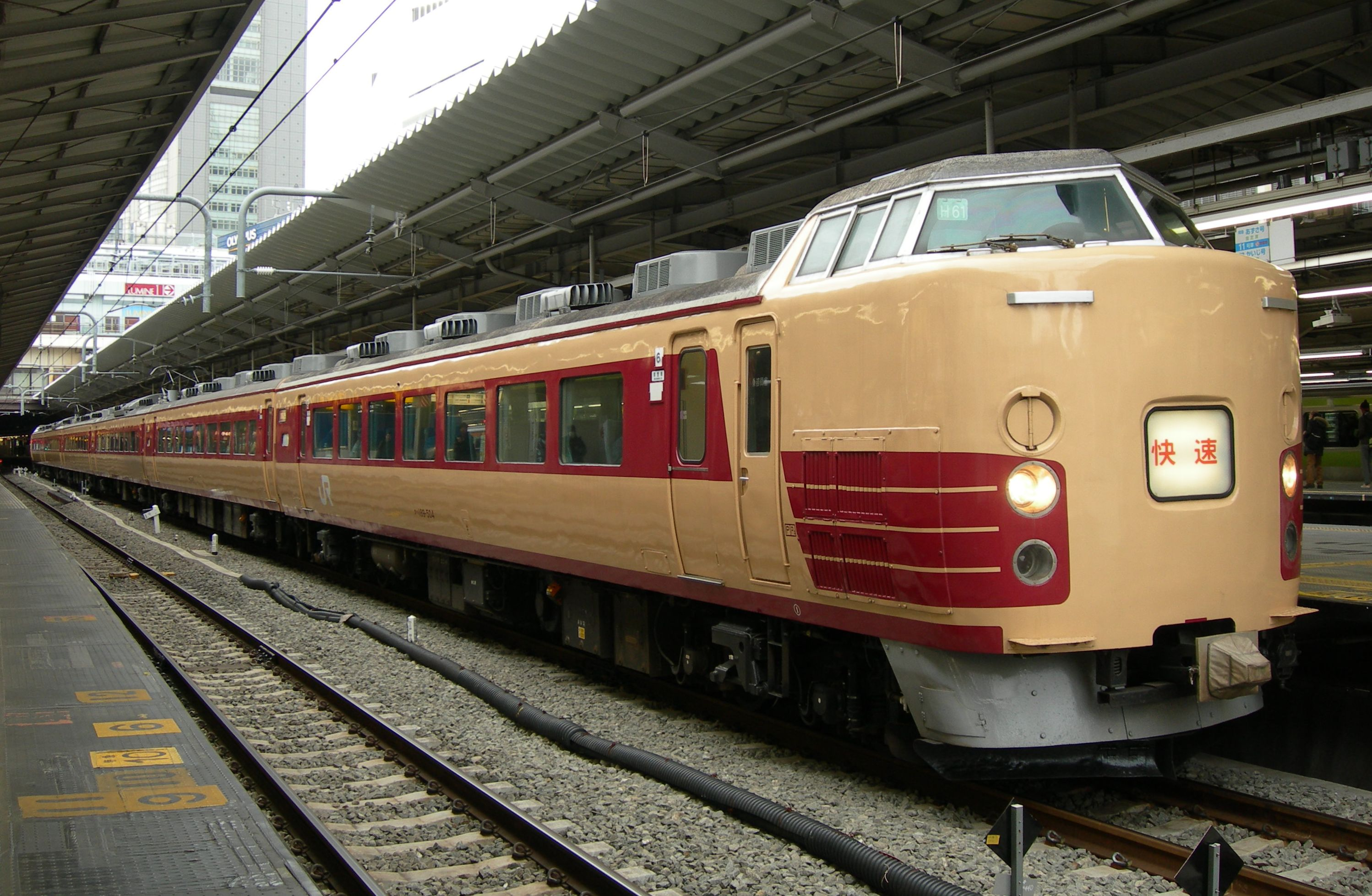 JR東日本 189系 H61編成